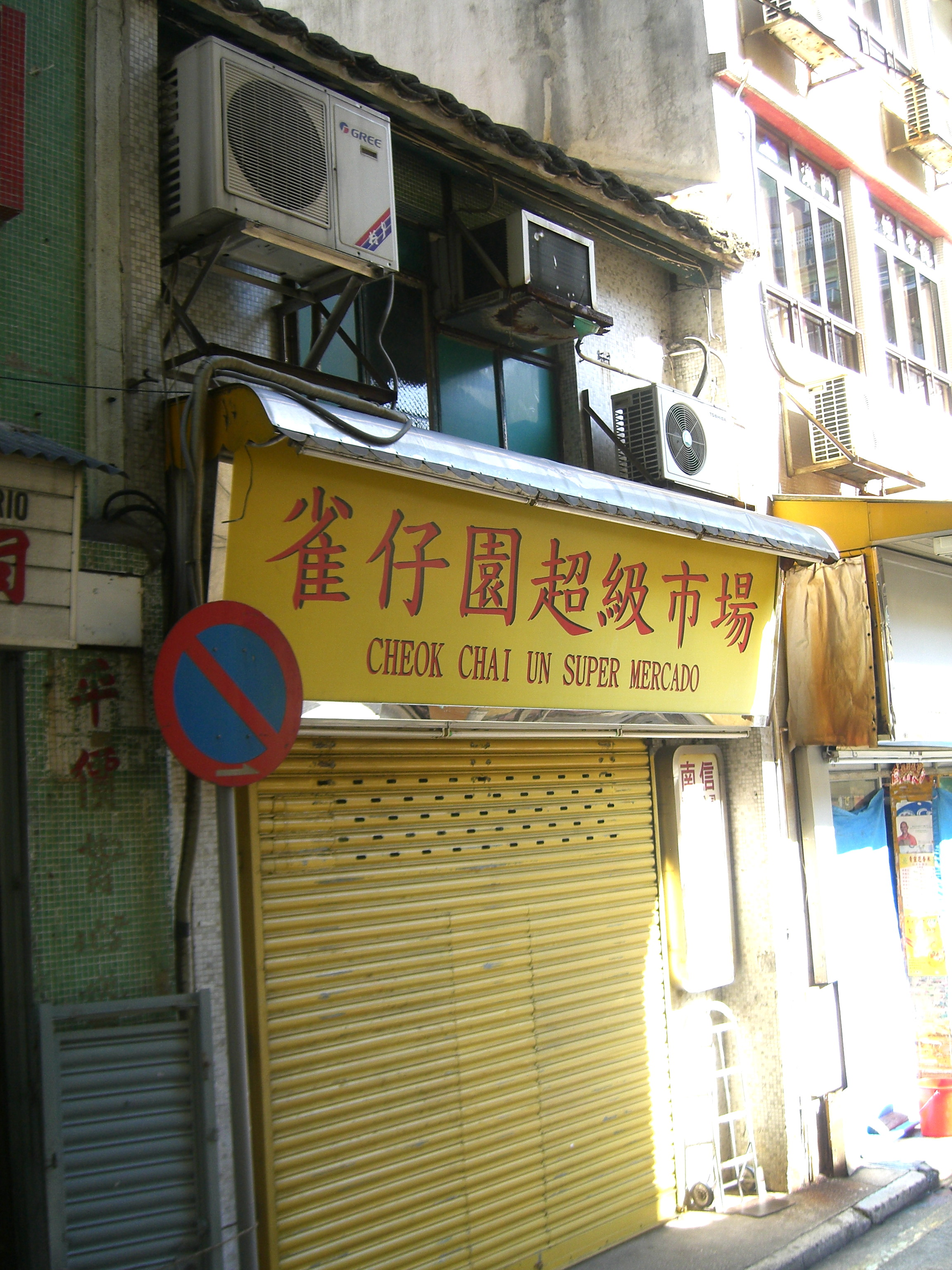 Cheok Chai Un Super Mercado